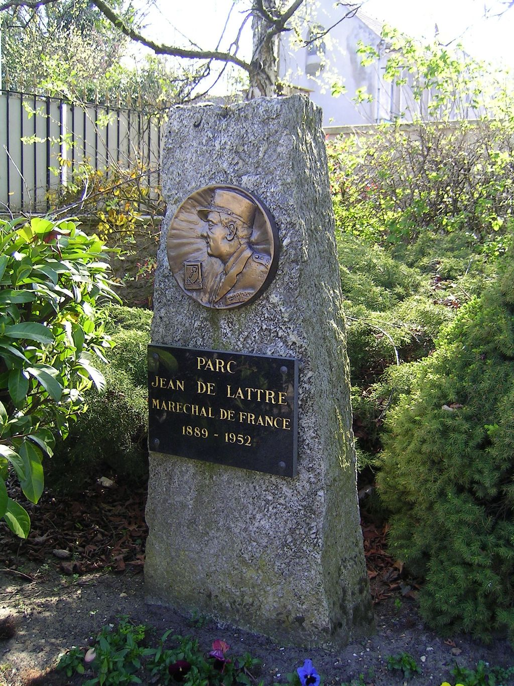 Statue de Jean De Lattre, parc de la Mairie Photo personnelle (own work) de Marianna